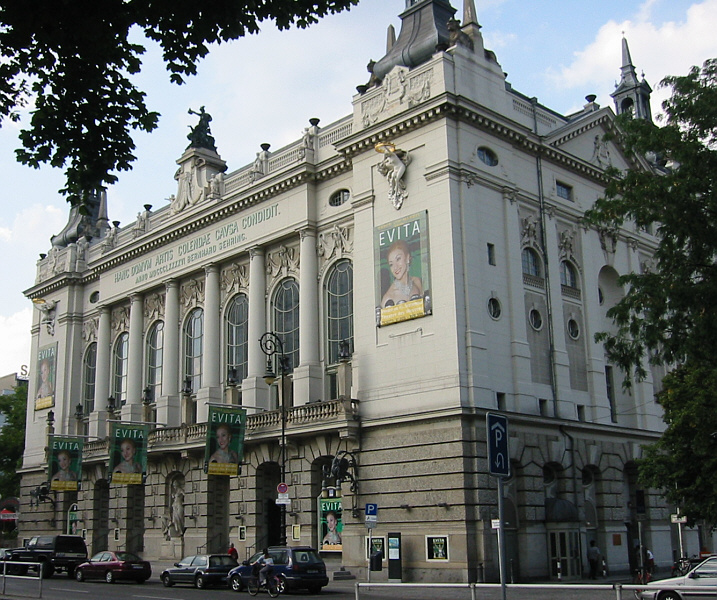 Berlin: Theater des Westens (built 1895-1896 by Bernhard Sehring) Location: Charlottenburg, Kantstraße 9-12